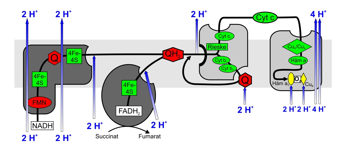 Detaillierte Darstellung des Elektronentransports in der Atmungskette